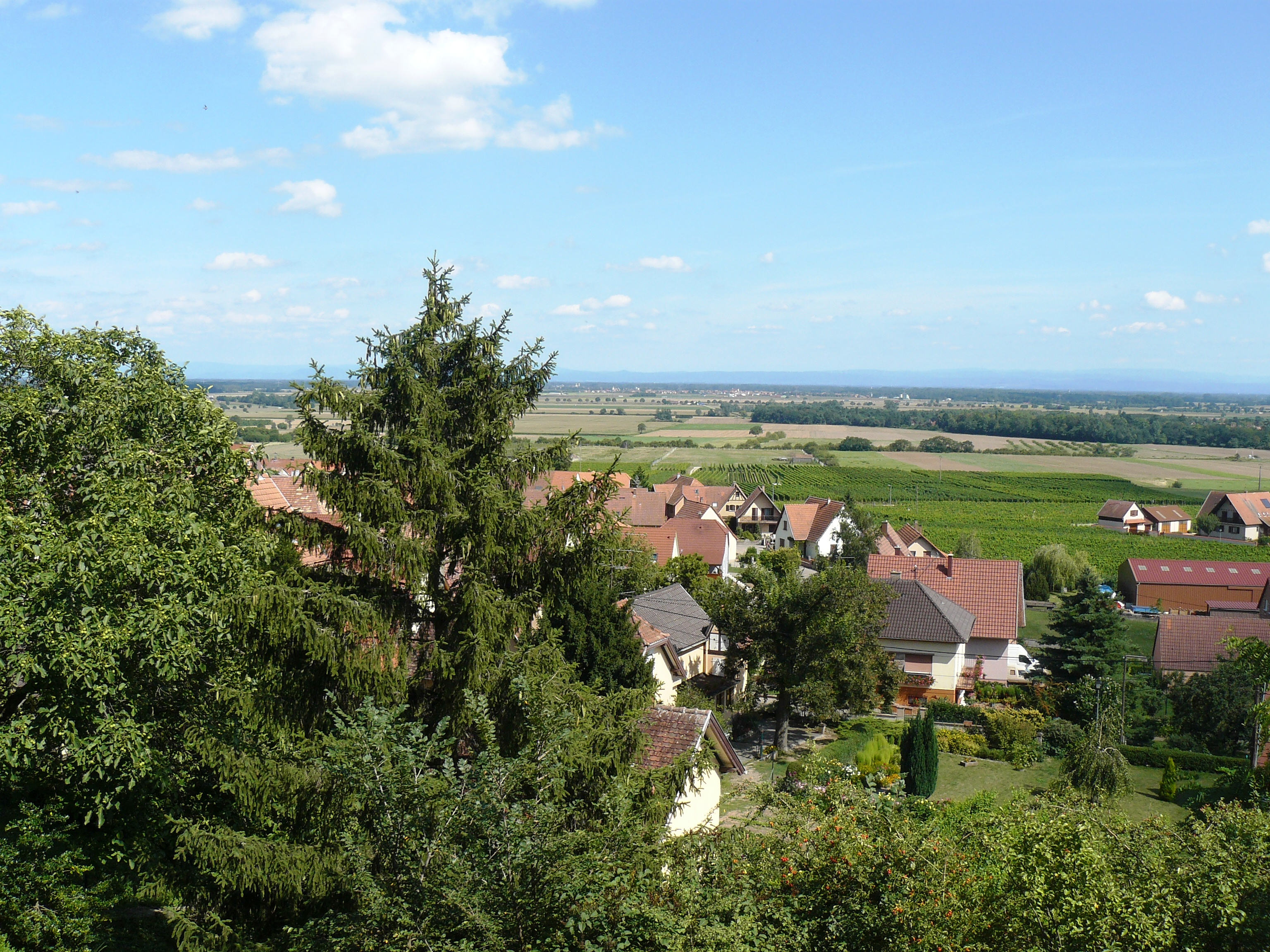 Une partie du village de Dieffenthal vers le bas